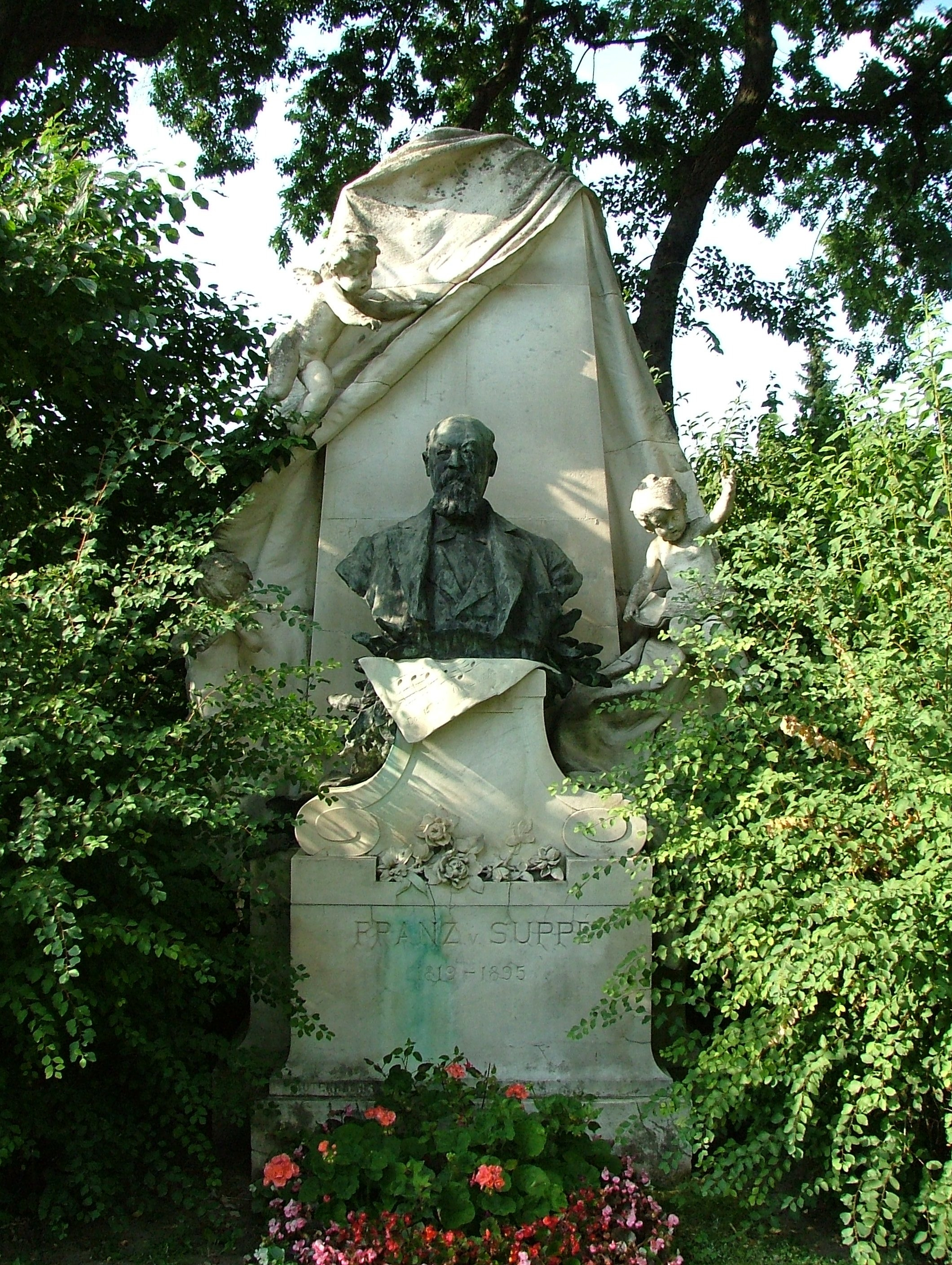 Grab von Franz Suppé auf dem Wiener Zentralfriedhof. Skulptur von Richard Karl Tautenhayn aus dem Jahre 1896. Auf dem "Papierblatt" unter der Büste stehen die Noten von Mein Österreich.